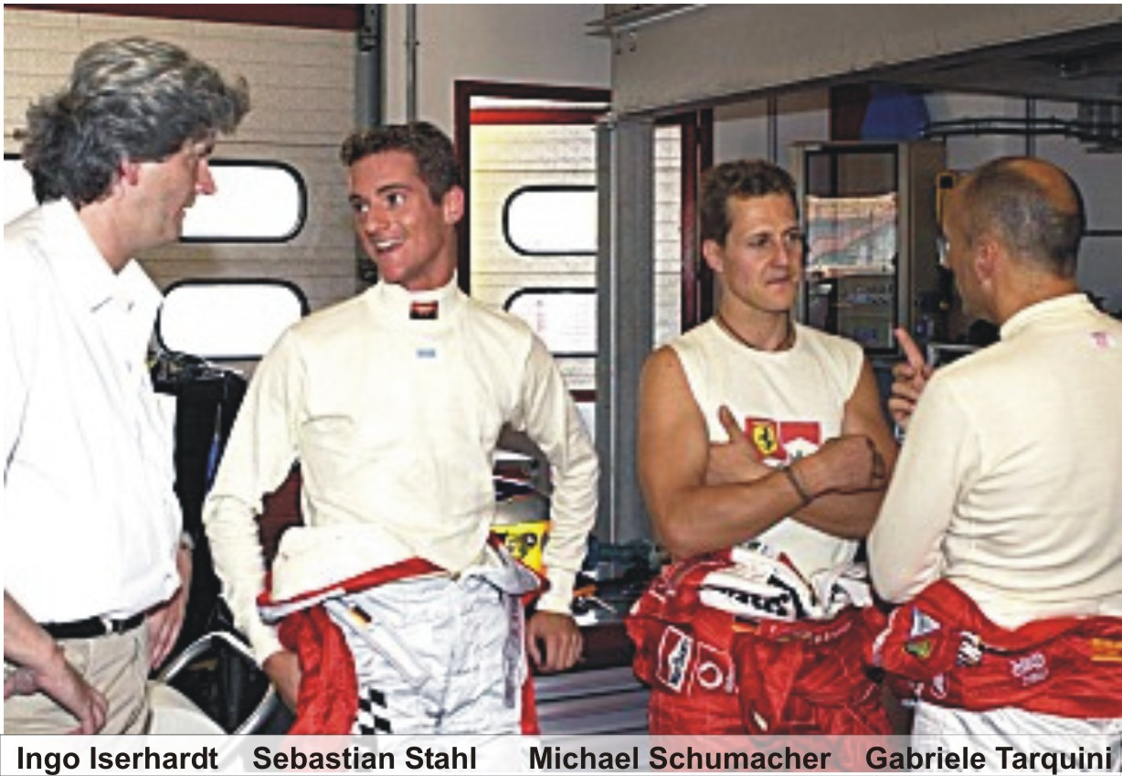 Alfa Romeo EM Test in Mugello 2003